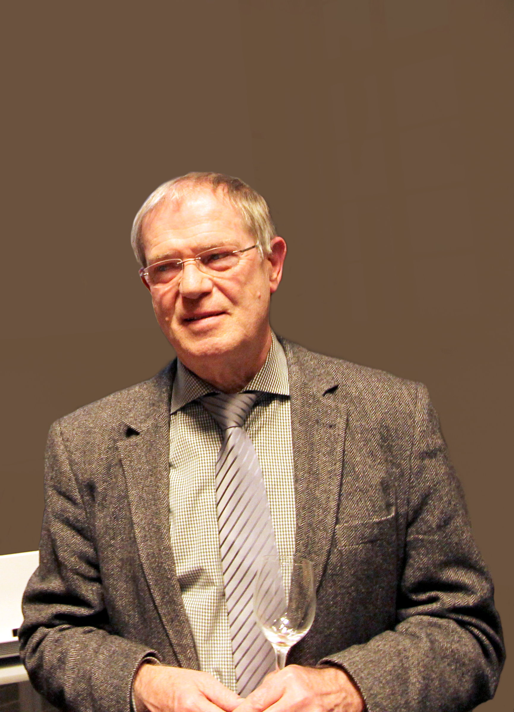 Prof. Dr. Werner Konold (Jahrgang 1950) studierte von 1970 bis 1975 Allgemeine Agrarwissenschaften an der Universität Hohenheim. Danach war er wissenschaftlicher Mitarbeiter am Institut für Landeskultur. 1983 promovierte er zum Dr. sc. agr. mit dem Thema „Zur Ökologie kleiner Fließgewässer. Verschiedene Ausbauarten und ihre Bewertung“. 1988 folgte der Abschluss der Habilitation „Oberschwäbische Weiher und Seen. Geschichte, Kultur, Vegetation, Limnologie und Naturschutz“ und Erlangung der „Venia legendi“ im Fach „Landeskultur“. (aus: Aufnahme von 2019.